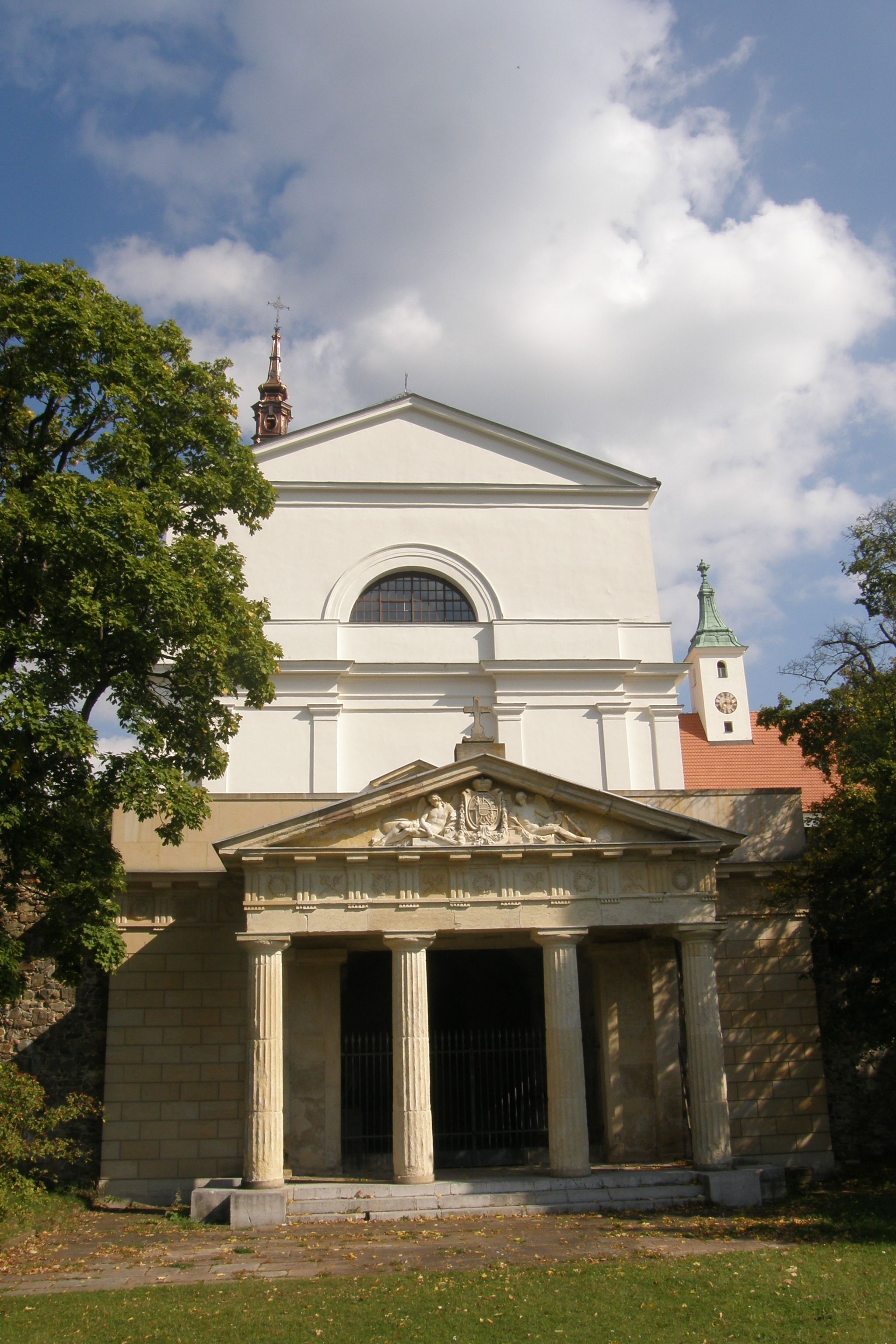 klášter paulánů (Vranov), Vranov 6 - hrobka Lichtensteinů